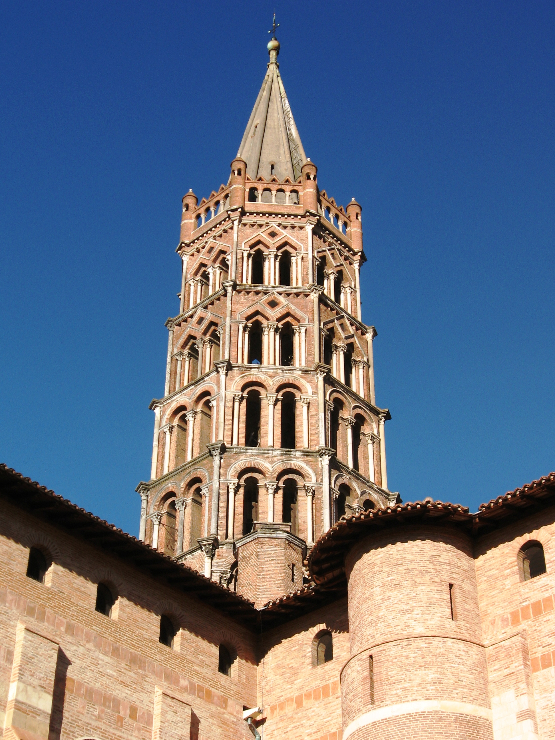 Le clocher .